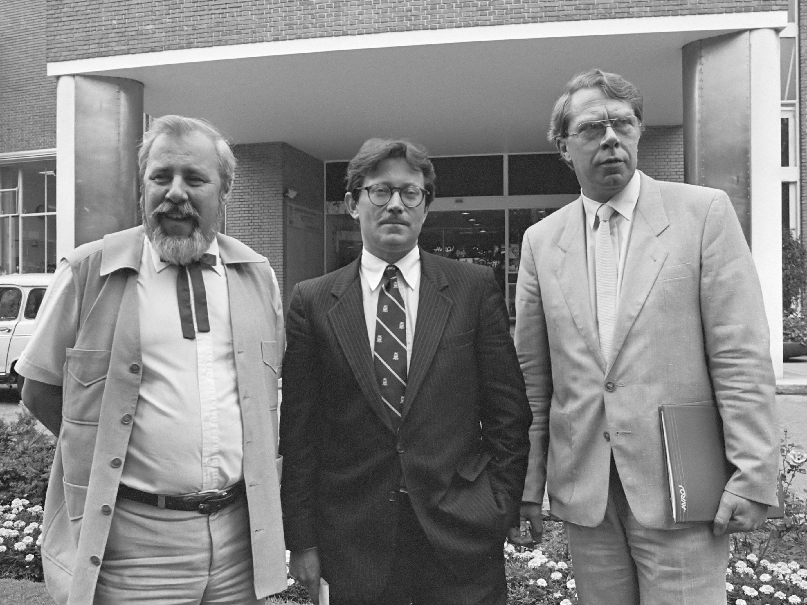 Persconferntie Avro; v.l.n.r. managers Kees Buurman , Fons van Westerloo , Chris Hoorn 4 september 1985